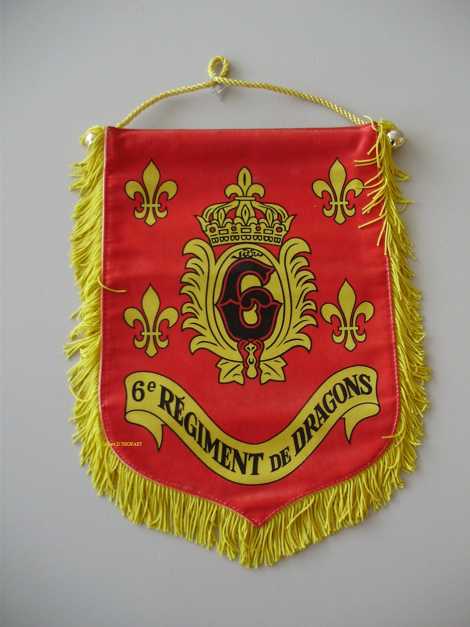 fanion du 6e Dragons à Besancon